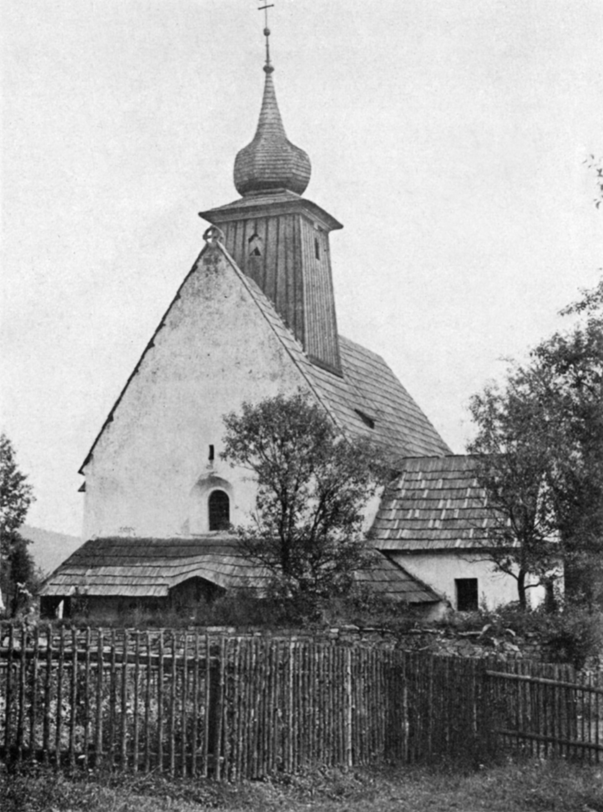 Kostel Nalezení svatého Kříže v obci Rybí, stav v roce 1921.